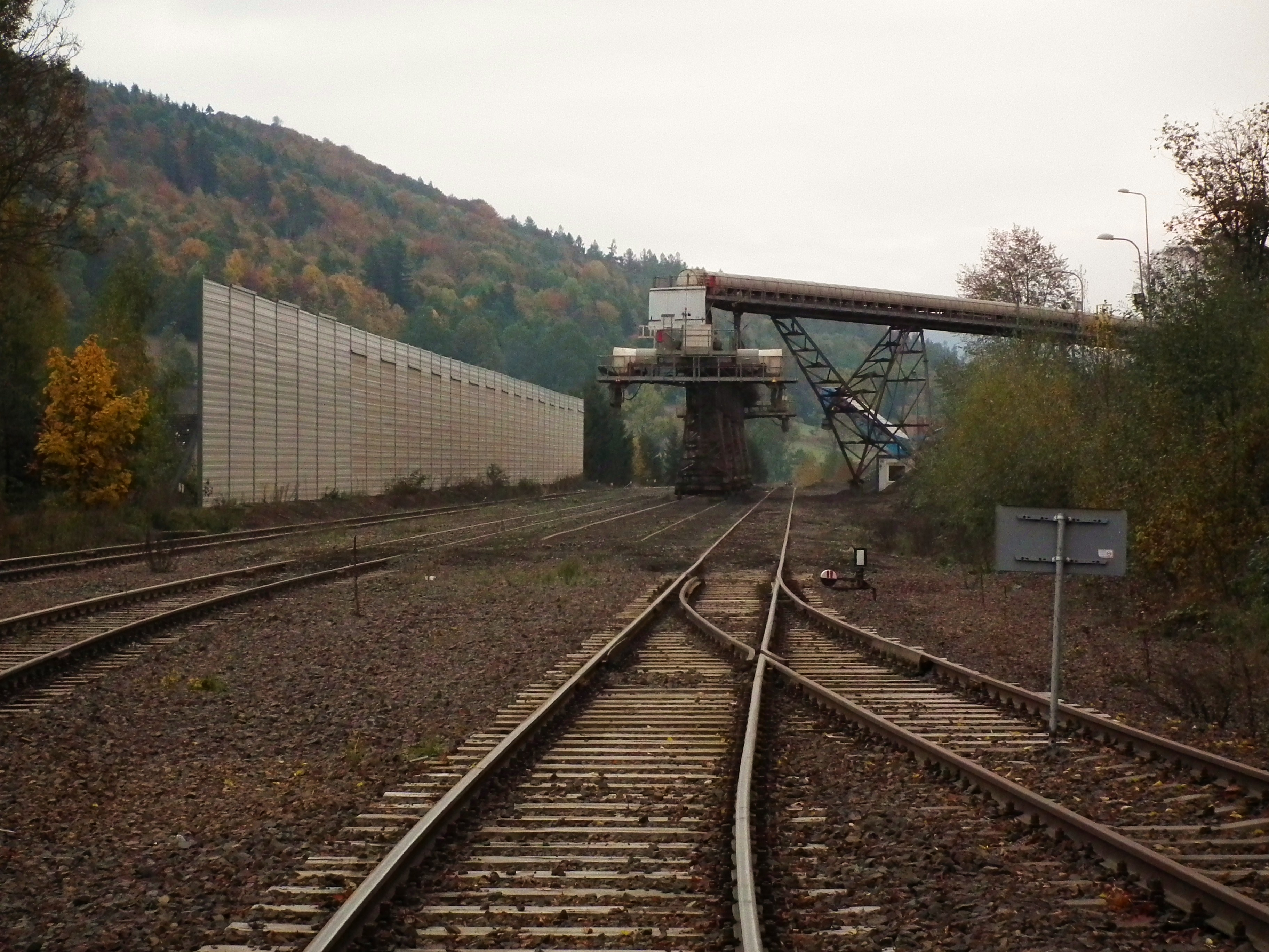 Impreza kolejowa Dolnośląskie Zakamaeki II w dniu 17 października 2015r. na liniach kolejowych Dolnego Śląska. Skład pociągu złożony z SA134-003 i SA134--007. Tłumaczów.